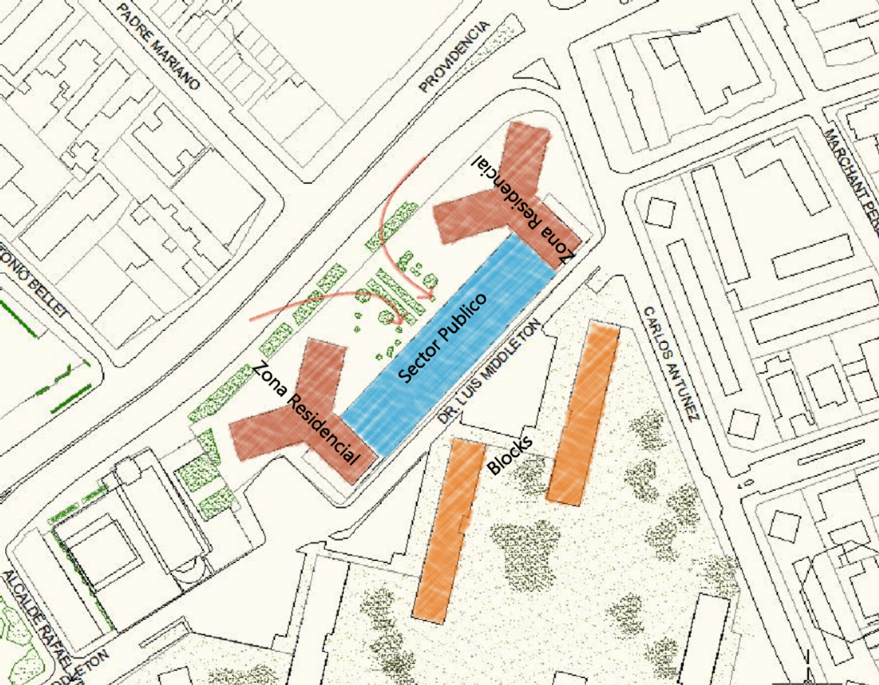 Vista superior o de planta de las Torres Carlos Antunez